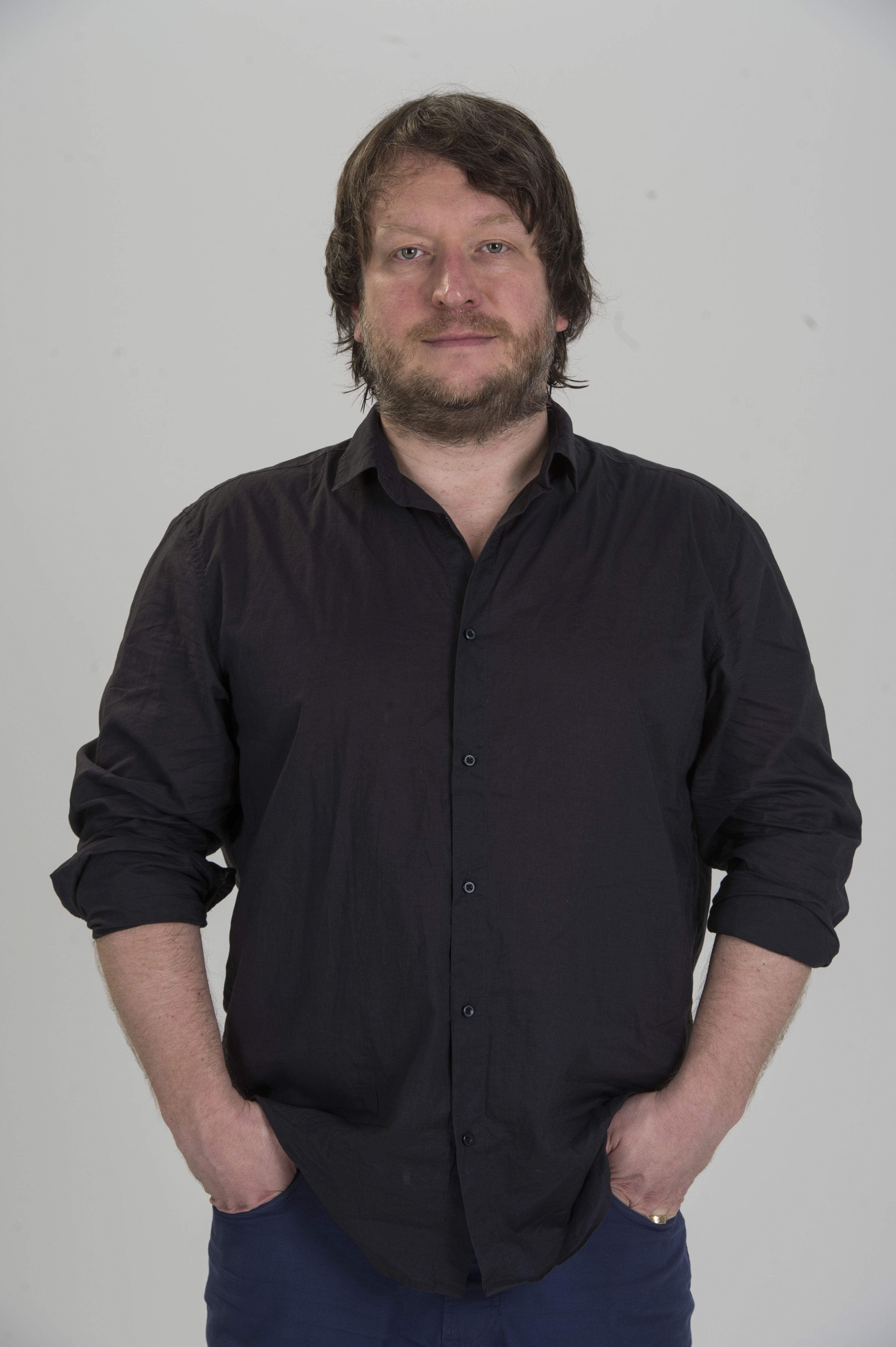 Siim Nestor